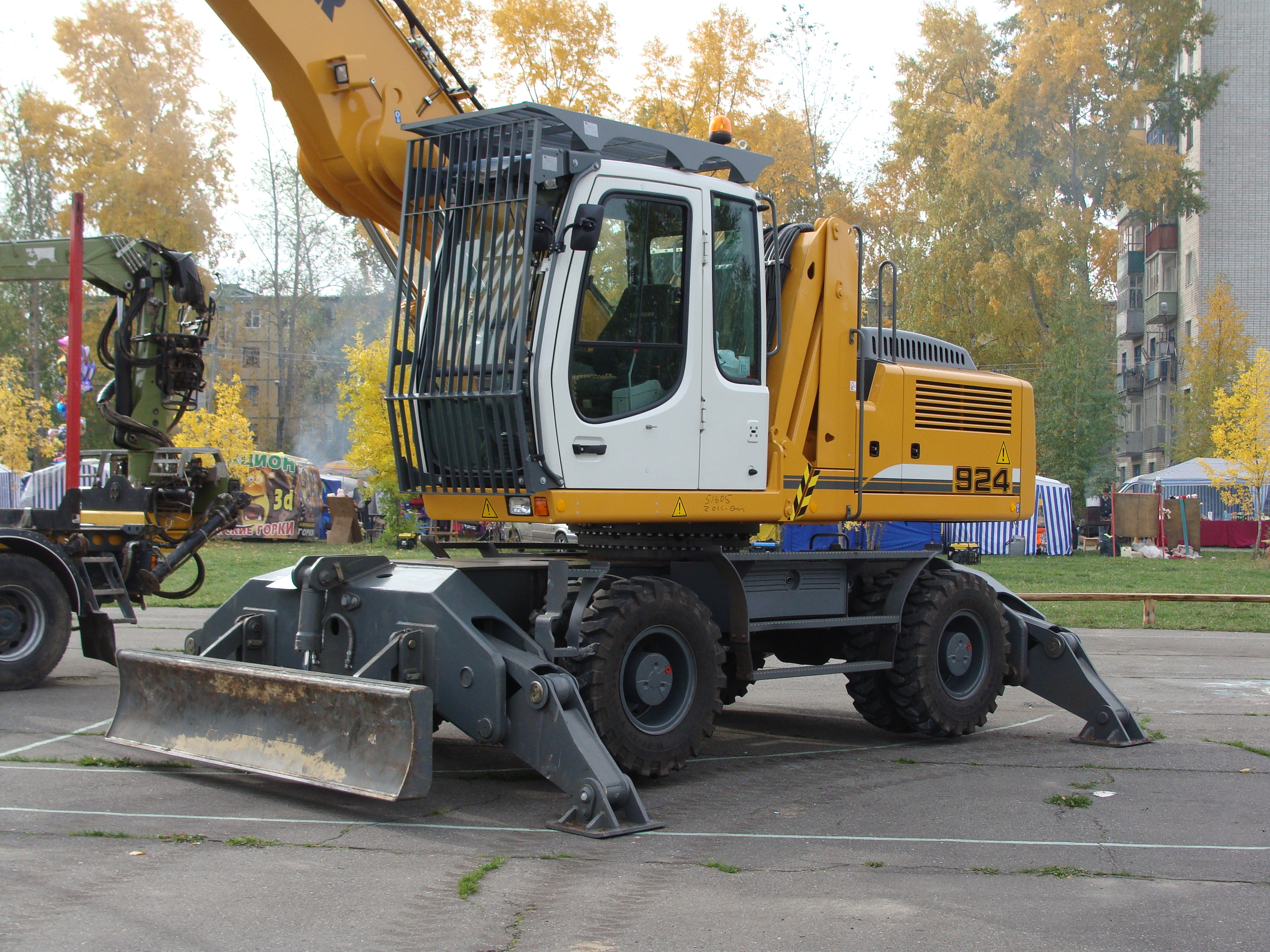 День работников леса. Коряжма 2010